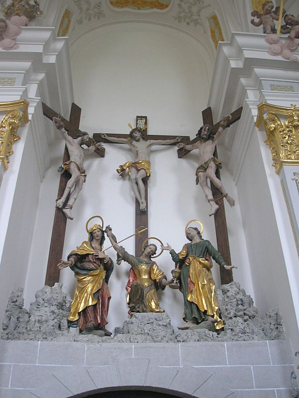 Kloster Oberschönenfeld bei Augsburg (Bayerisch-Schwaben). Kreuzigungsgruppe in der Kirche. Eigene Aufnahme, Sept. 2006 / Oberschoenenfeld Monastery near Augsburg (Bavaria, Germany). Crucifixion in the church. Own photo, Sept. 2006